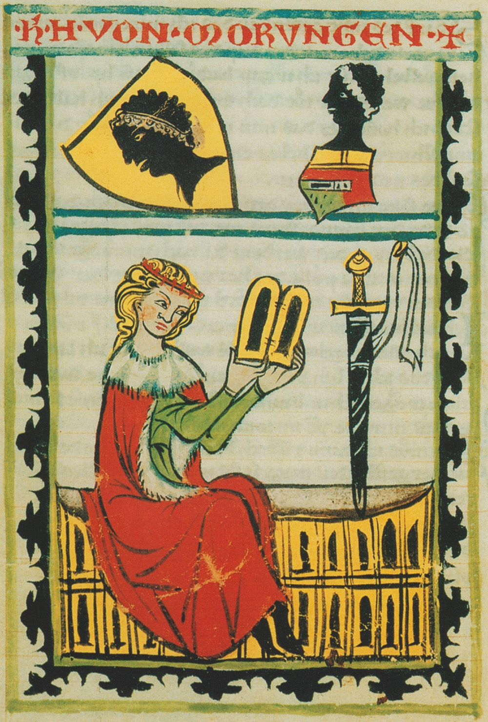 Abbildung des Minnesängers Heinrich von Morungen in der Weingartner Liederhandschrift.